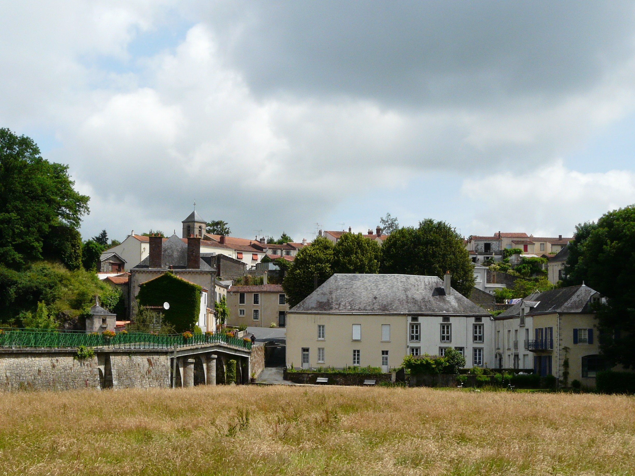 Vue générale de Mallièvre, Vendée, France